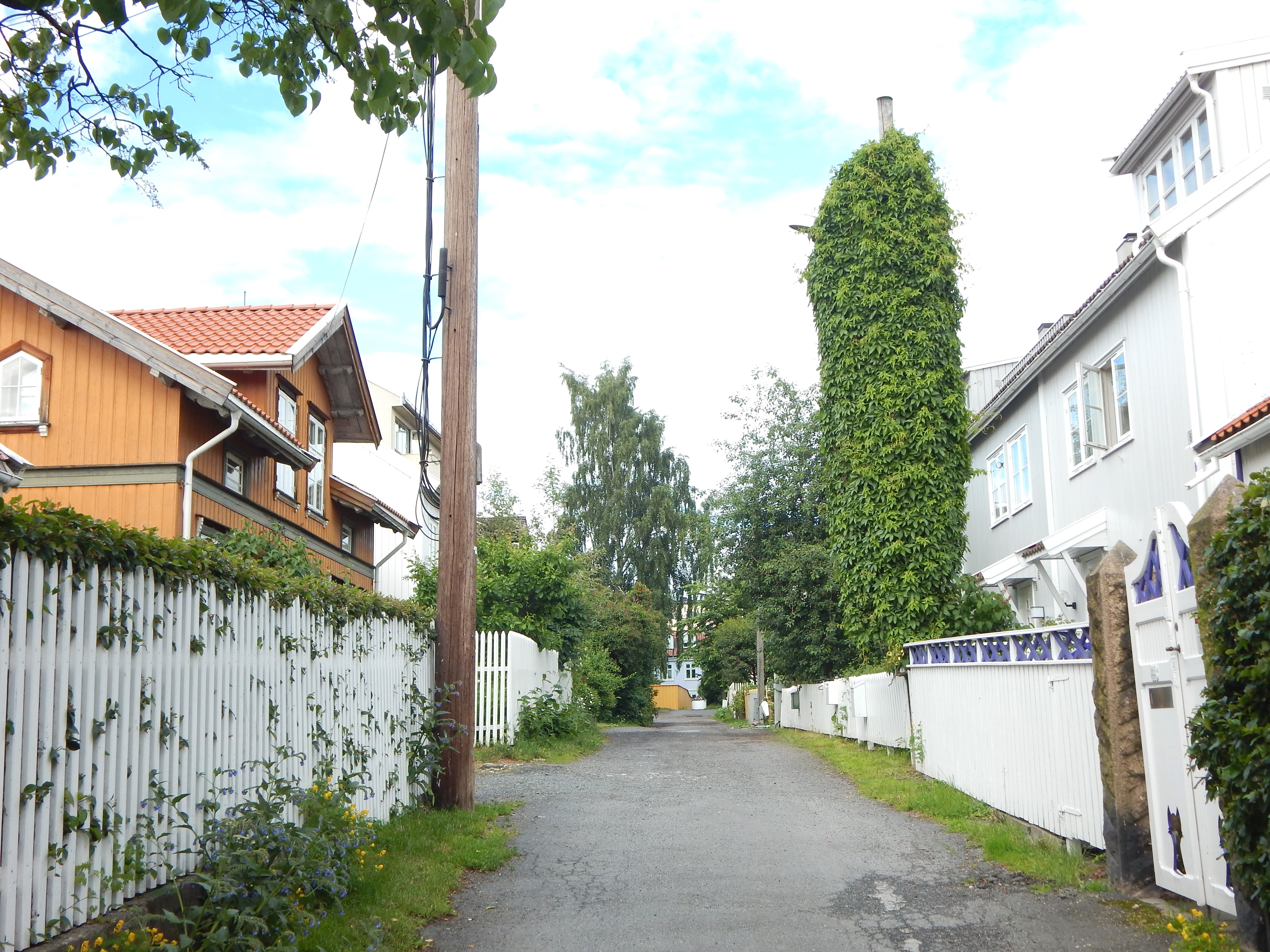 Bodøgata